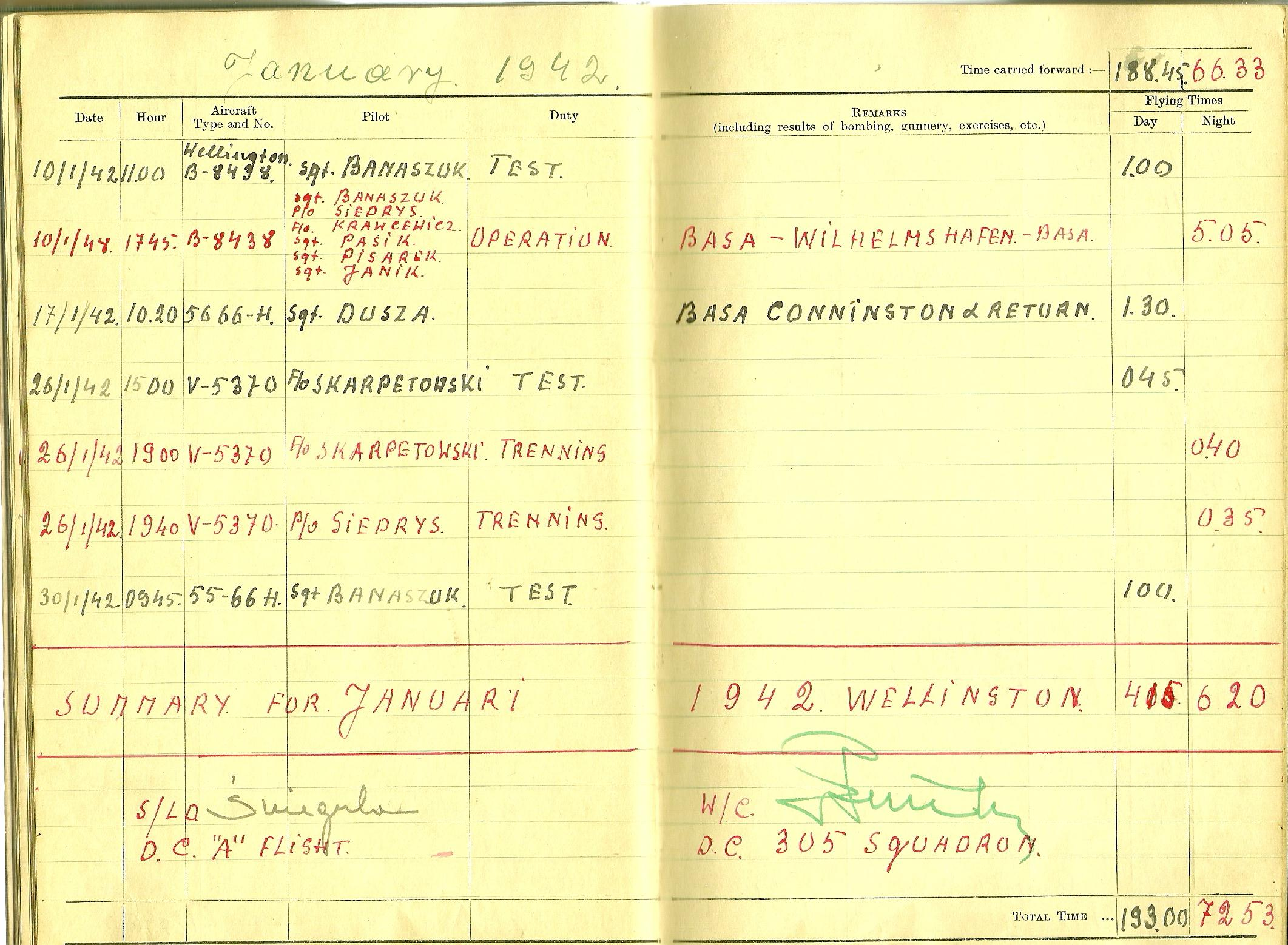 Polish Division 305: A page from the Flight Log